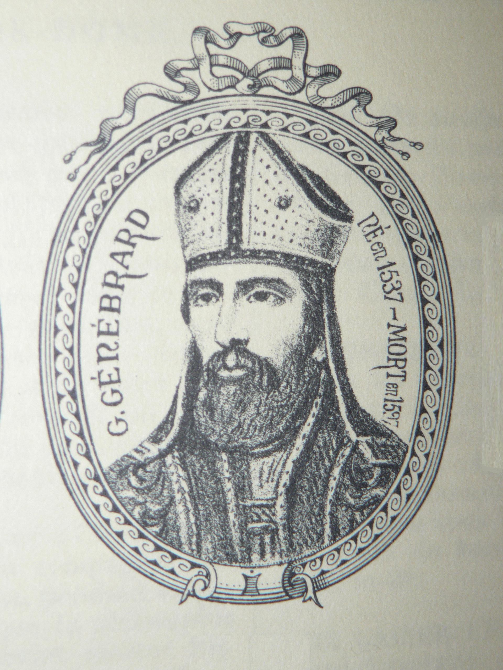 Portrait de Gilbert Génébrard (1537-1597), religieux et théologien chrétien français.